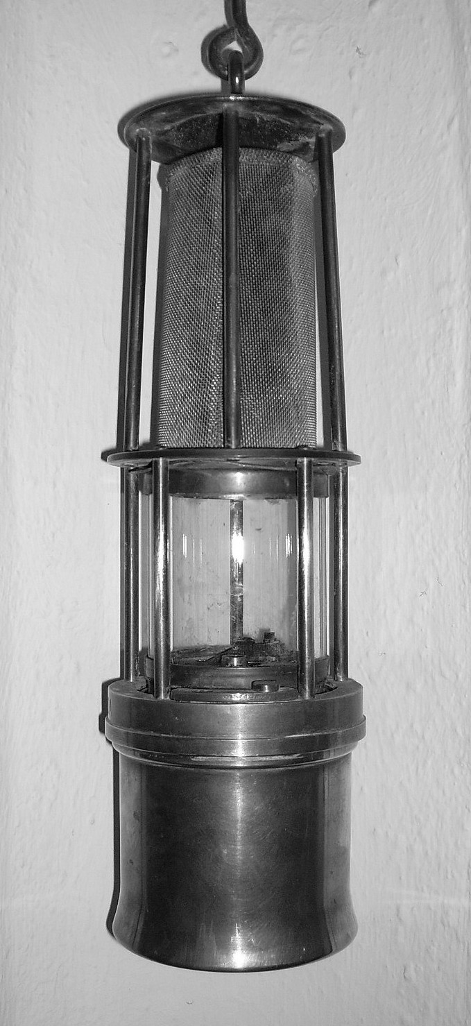 Grubenlampe aus Göttelborn